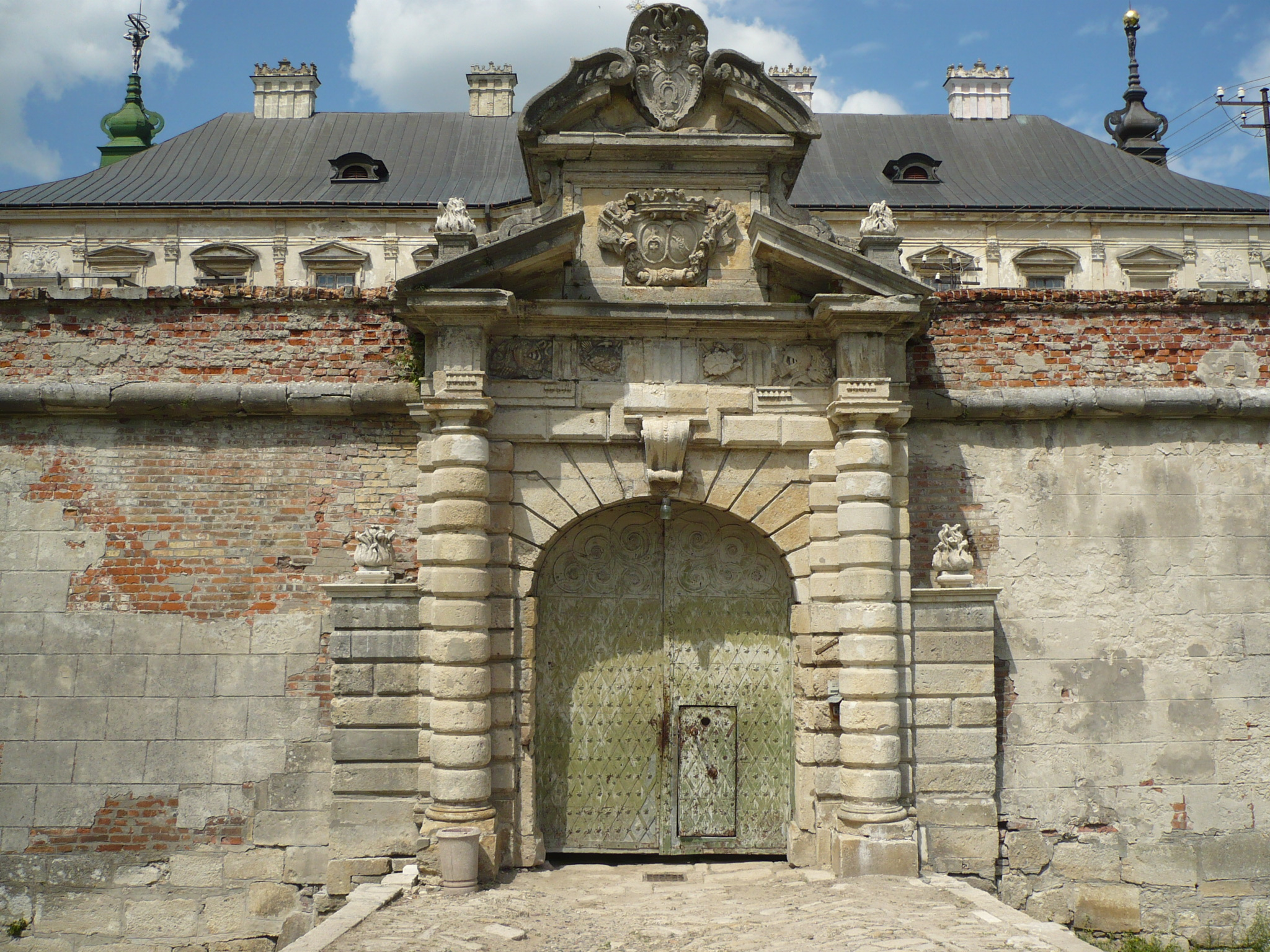 Pałac w Podhorcach, brama, 2012 r.